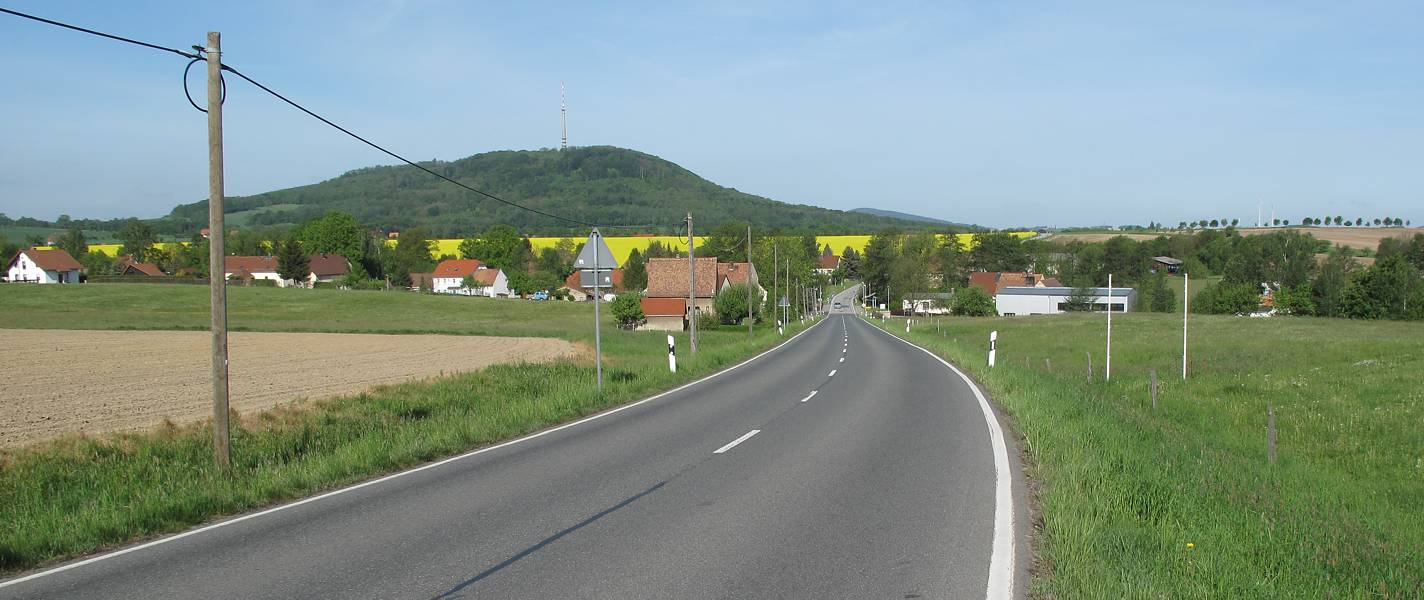 Rosenbach bei Löbau